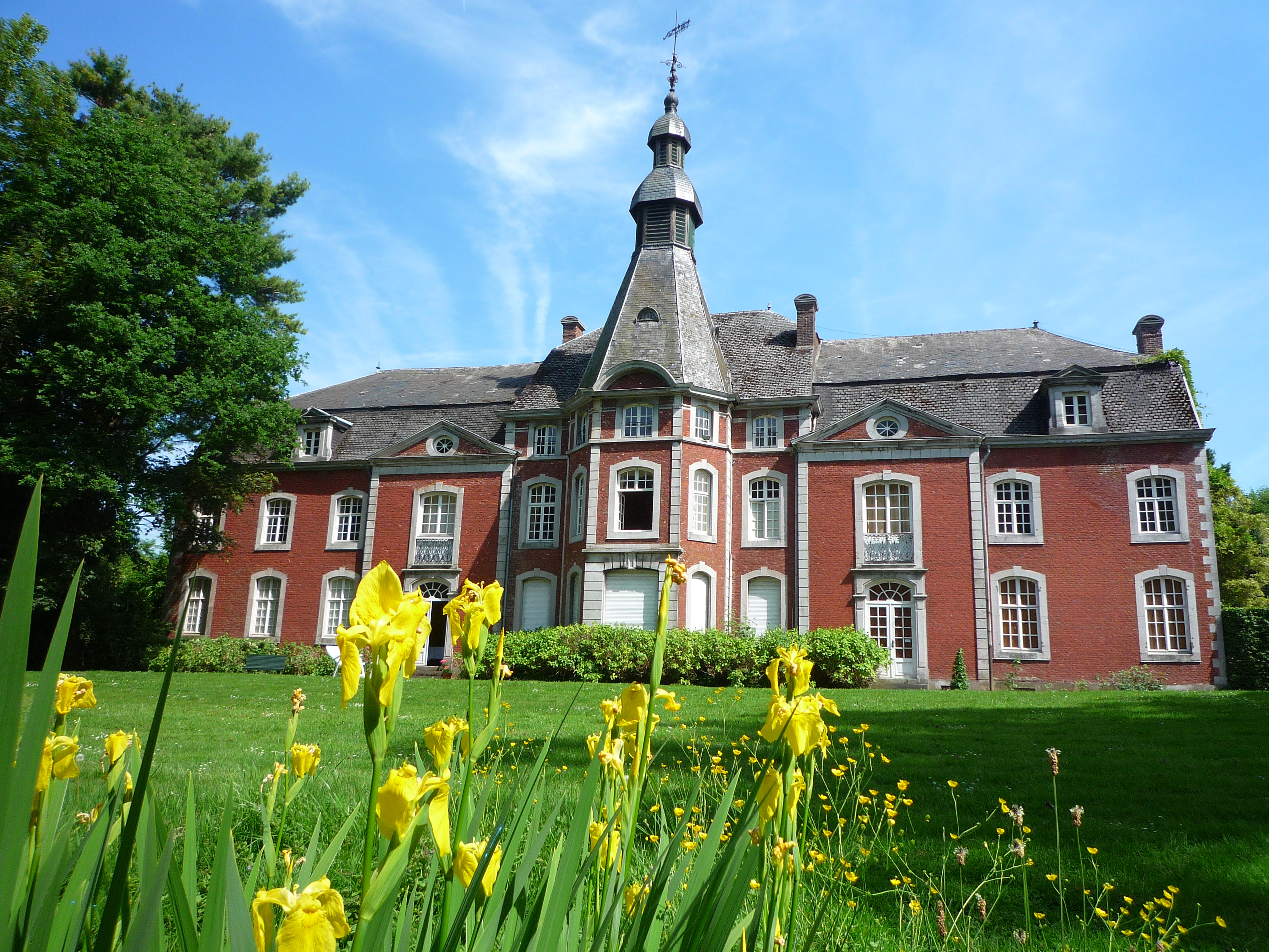 Château de Boëlhe vu de l'étang